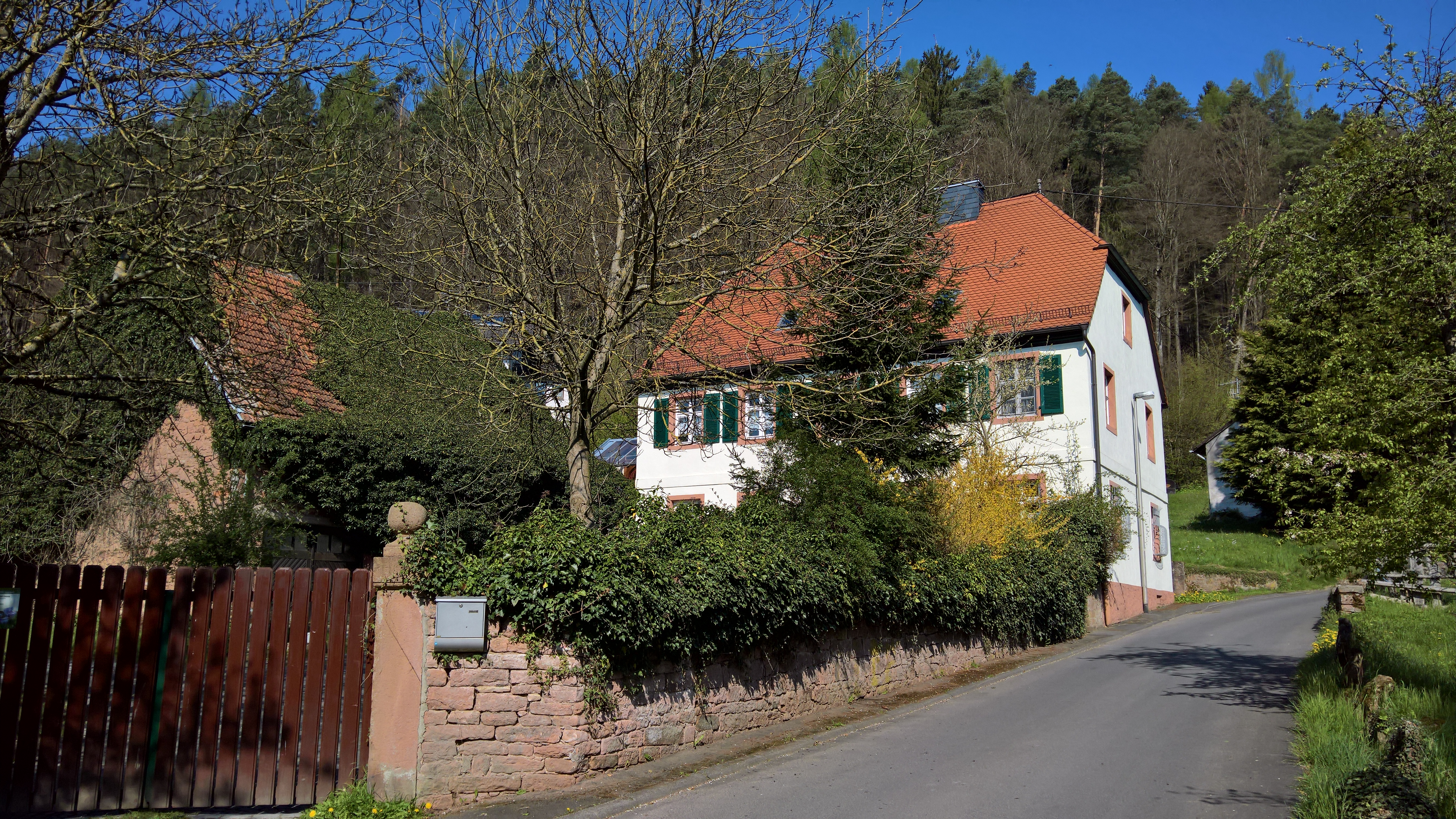 Blick von der Infotafel zum ehemaligen Mainzer Forstamt (Unterschnorrhof)